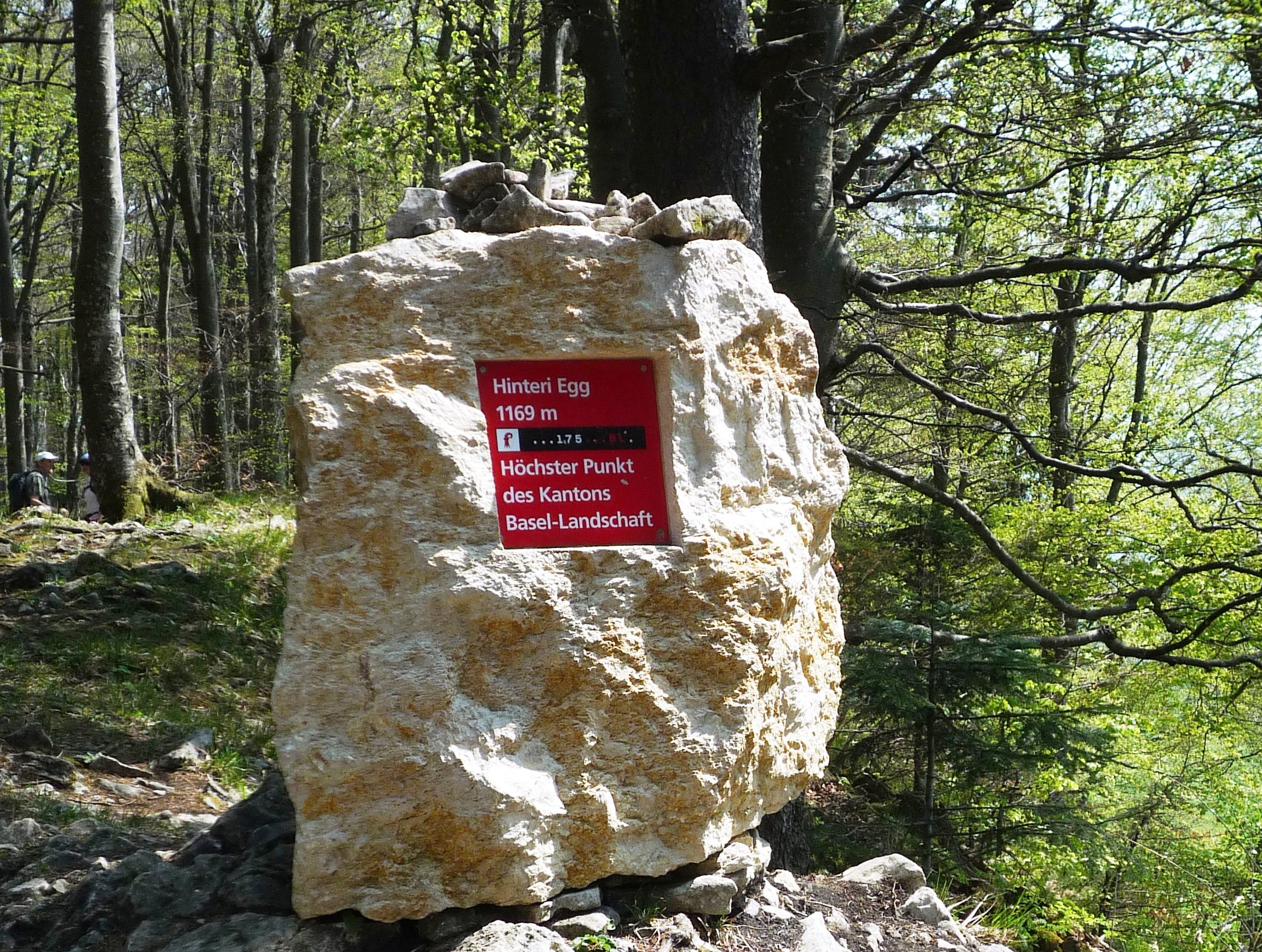 Hinteri Egg - höchster Punkt (1169 m) des Kantons Basel-Landschaft